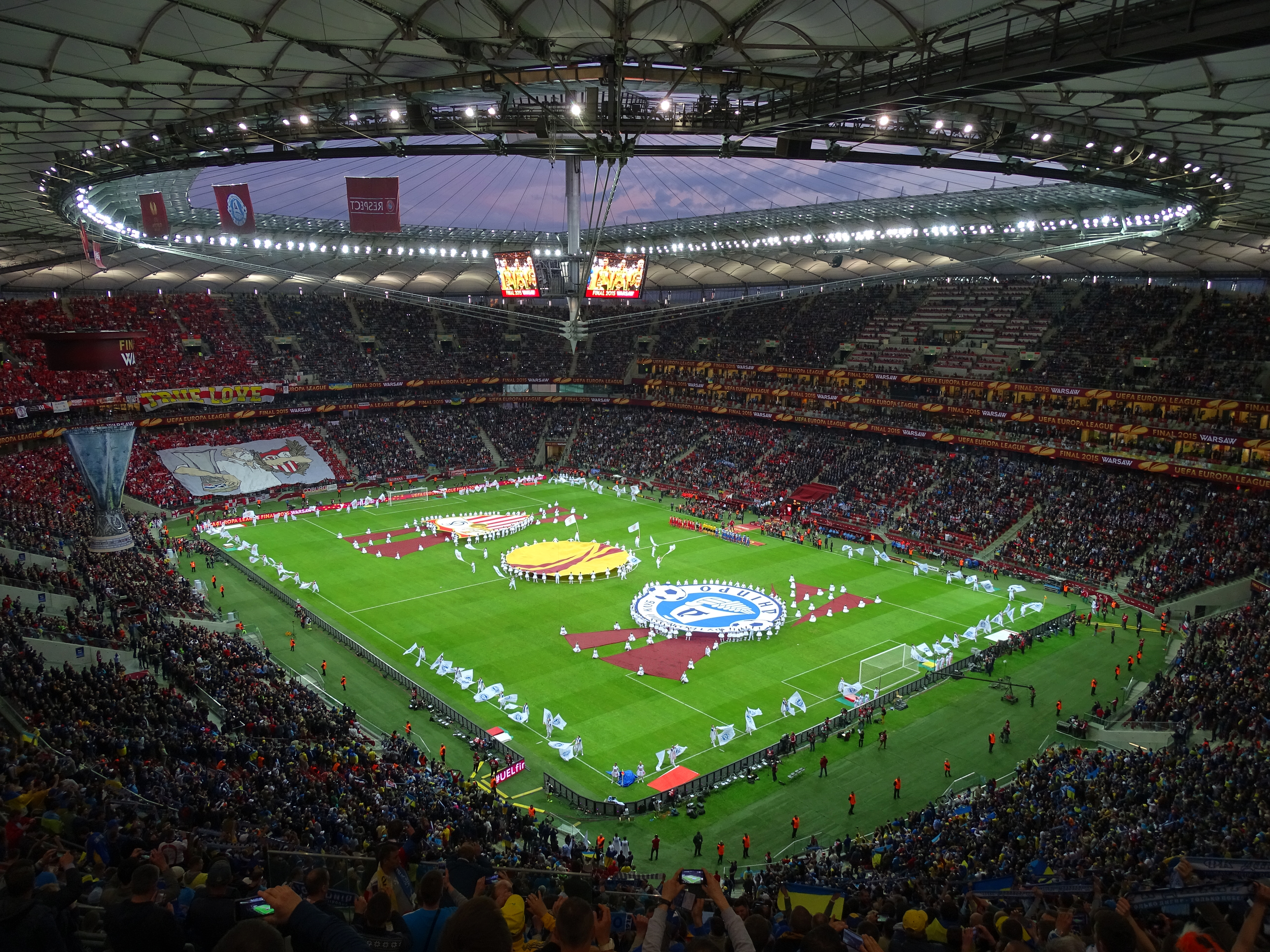 Cérémonie d'ouverture de la finale de la Ligue Europa 2014-2015